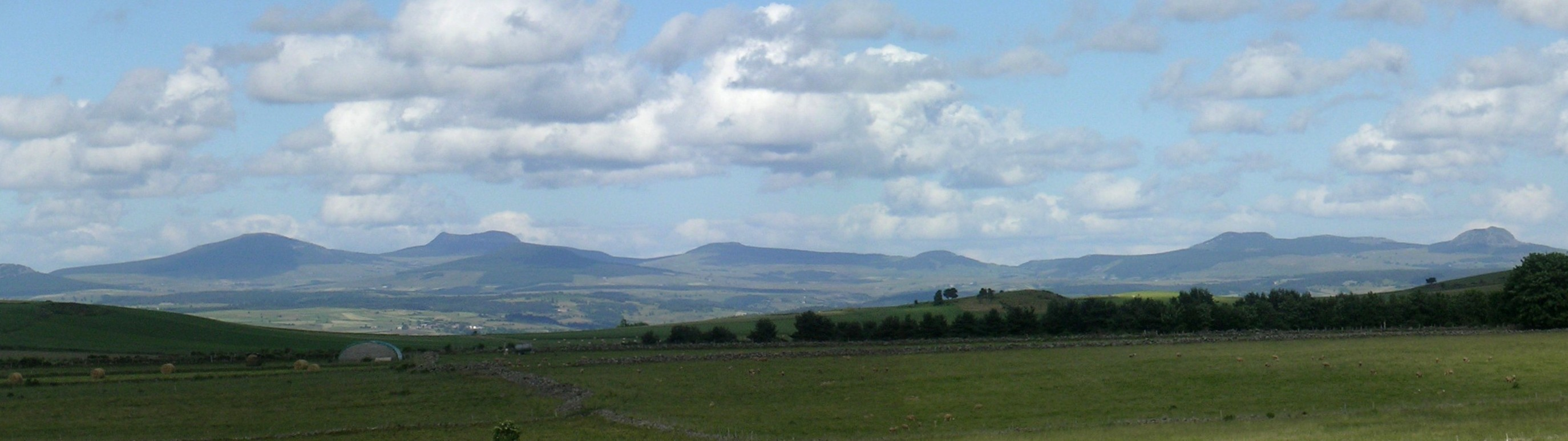 Vue sur le massif du Mezenc depuis les monts du Devès.